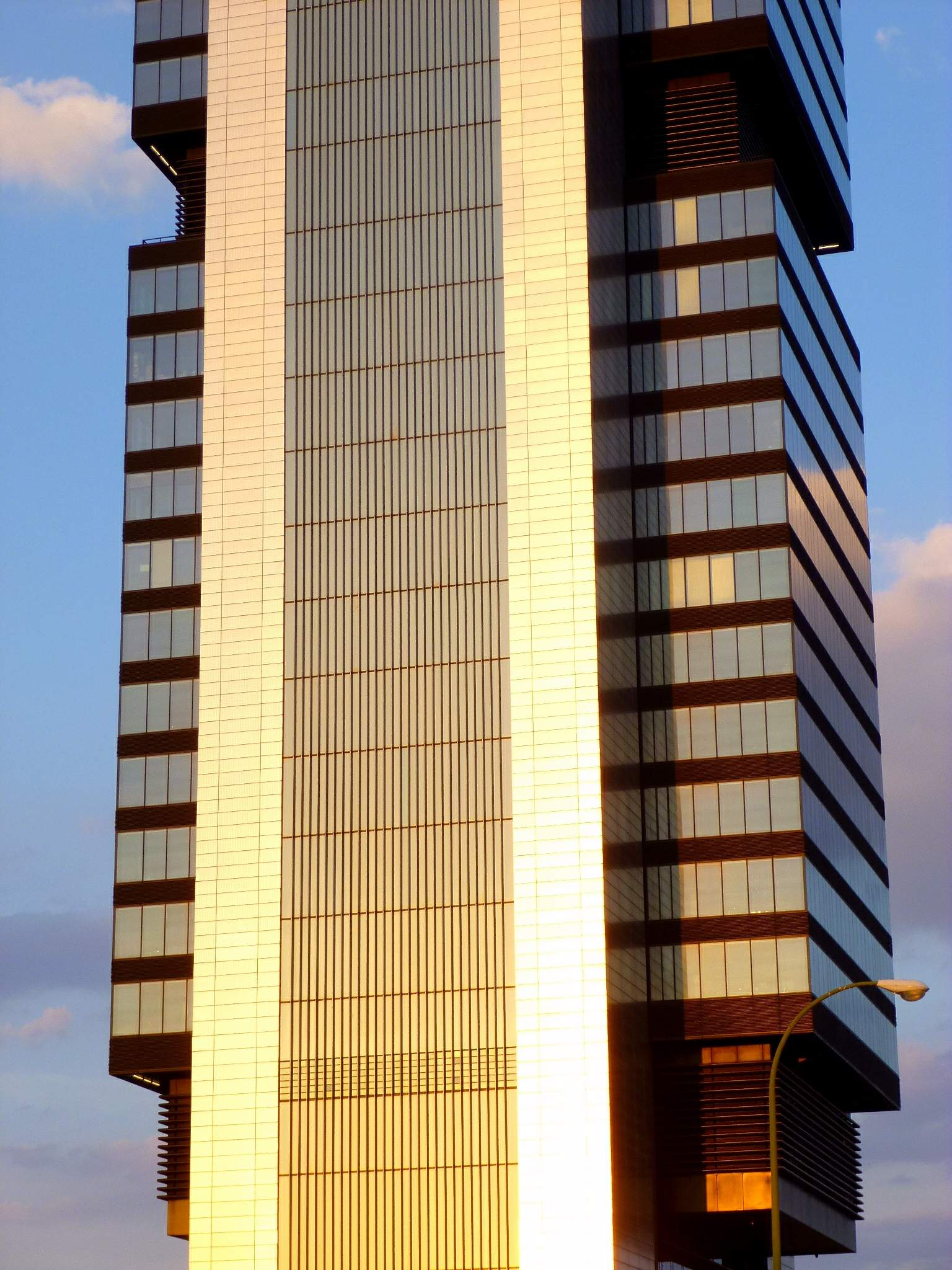 Torre Caja Madrid, en la CTBA de Madrid